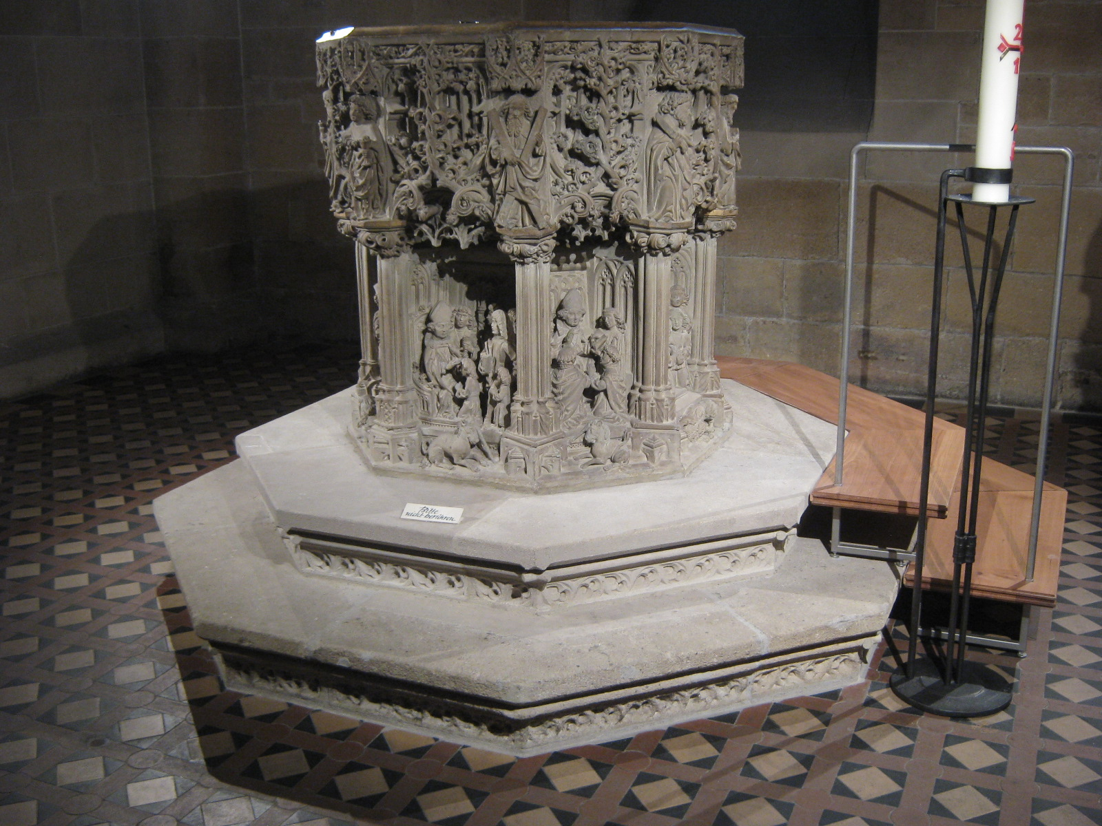 Der achteckige Taufstein im nationalen Kulturdenkmal Marienkirche Reutlingen wurde 1499 von Martin Schmidt im Stil der Spätgotik erbaut. In der dreiteiligen Gliederung stehen zuoberst acht Apostel unter Baldachinen. Gegen den Uhrzeigersinn sind erkennbar: Johannes, Andreas, Bartholomäus und teilweise Philippus. In den acht Nischen sind die Taufe Christi und die sieben Sakramente dargestellt: Davon sind das Sakrament der Firmung, das Sakrament der Priesterweihe, und teilweise das Sakrament der Ehe zu sehen. Unterhalb der Nischen sind jeweils liegende Tierfiguren zwischen den Sockeln, auf denen die Apostel stehen, ausgeführt.